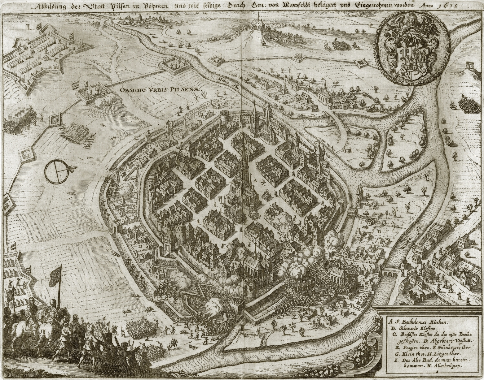 Stadt Pilsen (Plzeň, Tschechien), Einnahme der Stadt durch ein Heer der Stände unter Ernst von Mansfeld am 21. November 1618.